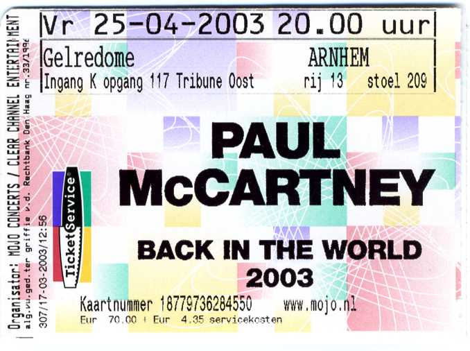 Concert kaart voor het concert van Paul McCartney in Arnhem, 25 april 2003. Collectie en afbeelding: Sander Lamme.